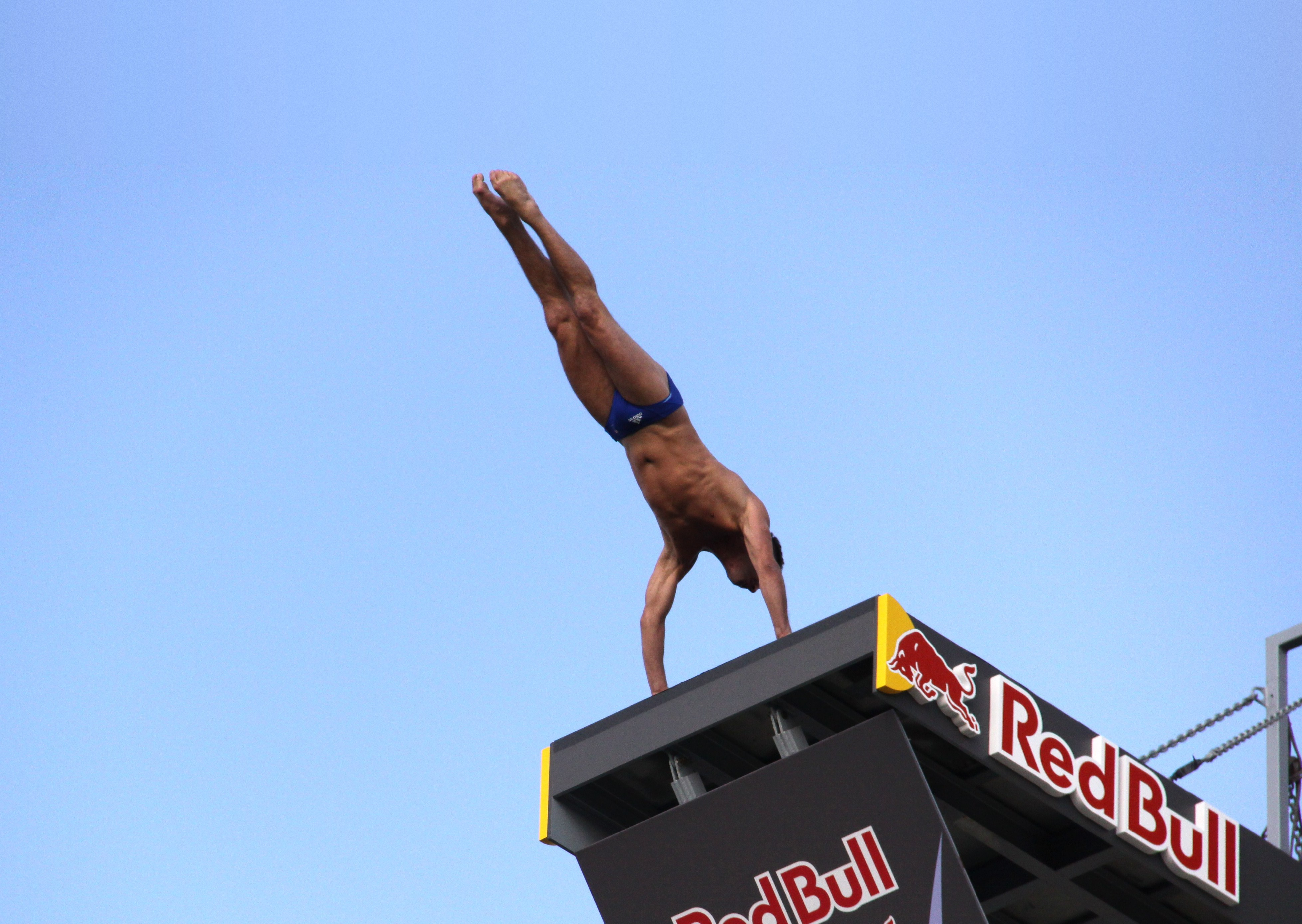 Cette serie de photographies (numérotée de 1 à 91) concerne la quatrième étape (arrêt) du championnat Red Bull Cliff Diving World Series 2011 qui s' est déroulée à La Rochelle le 18 juin 2011. Ces phonographies montrent la Tour Saint-Nicolas avec le plongeoir (1-3, 83, 84), le plongeoir (4), les plongeurs (5-8, 50, 59, 64, 67, 68, 73, 74, 86), les sauts (9-23, 27-38, 40-47, 49, 51-55, 58, 60-63, 70, 71, 78-80), la réception des plongeurs dans l' eau (77, 72), les mombreux médias (26, 39, 66, 69), le présentateur de l' épreuve (25), le jury (81, 82), la remise des prix (85-89), le public (11, 48, 56, 66, 90), les plongeurs de la sécurité (75) et le port après la compétition (90, 91). La Rochelle, Charente Maritime, France.